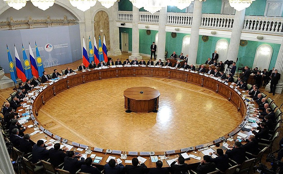 Саммит Россия - Казахстан, Екатеринбург, 2013г